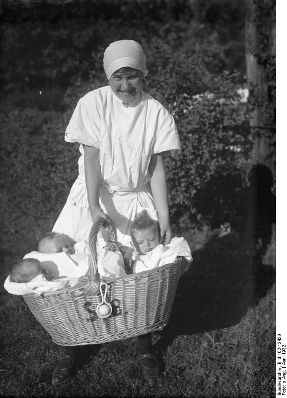 Ein Korb voll jungen Leben´s ! Säuglinge der Reichsanstalt zur Bekämpfung der Säuglings- und Kindersterblichkeit werden im Körbchen von einer Schwester an die Frühlingssonne gebracht.